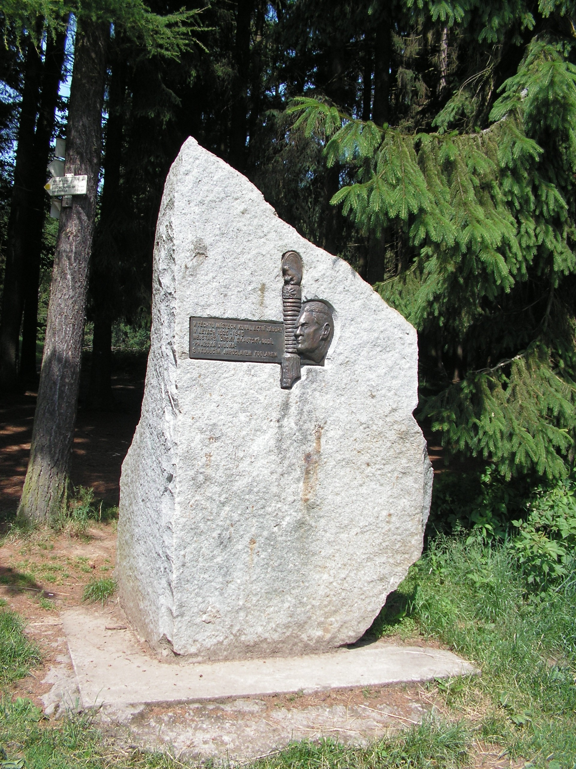 Památník Jaroslava Foglara ve Sluneční zátoce nedaleko Ledče nad Sázavou.